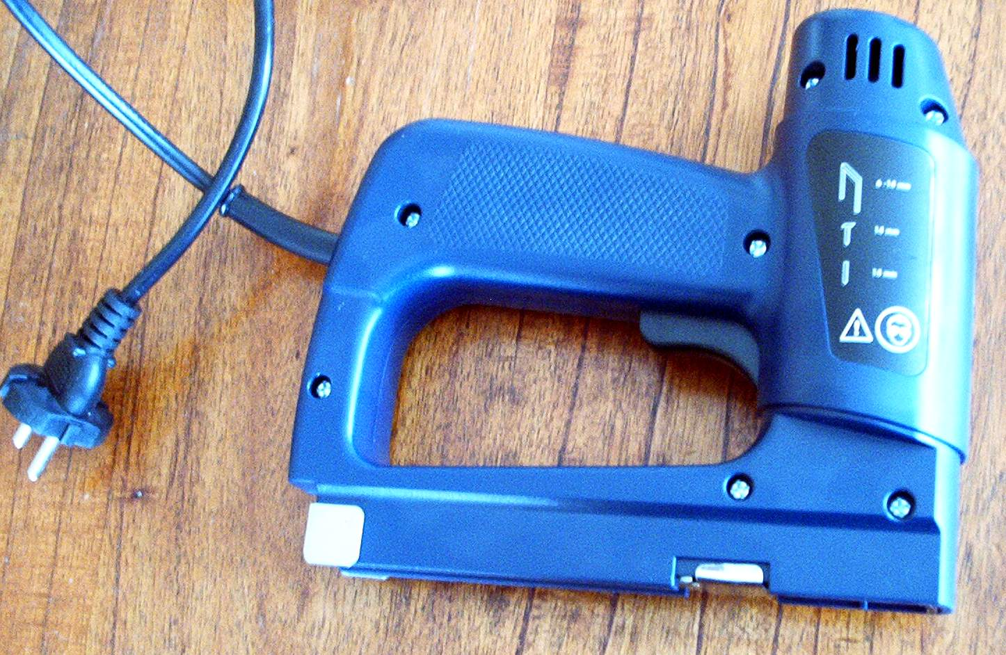 zelfgemaakte foto voor het publiek domein van Wikipedia. Martink.